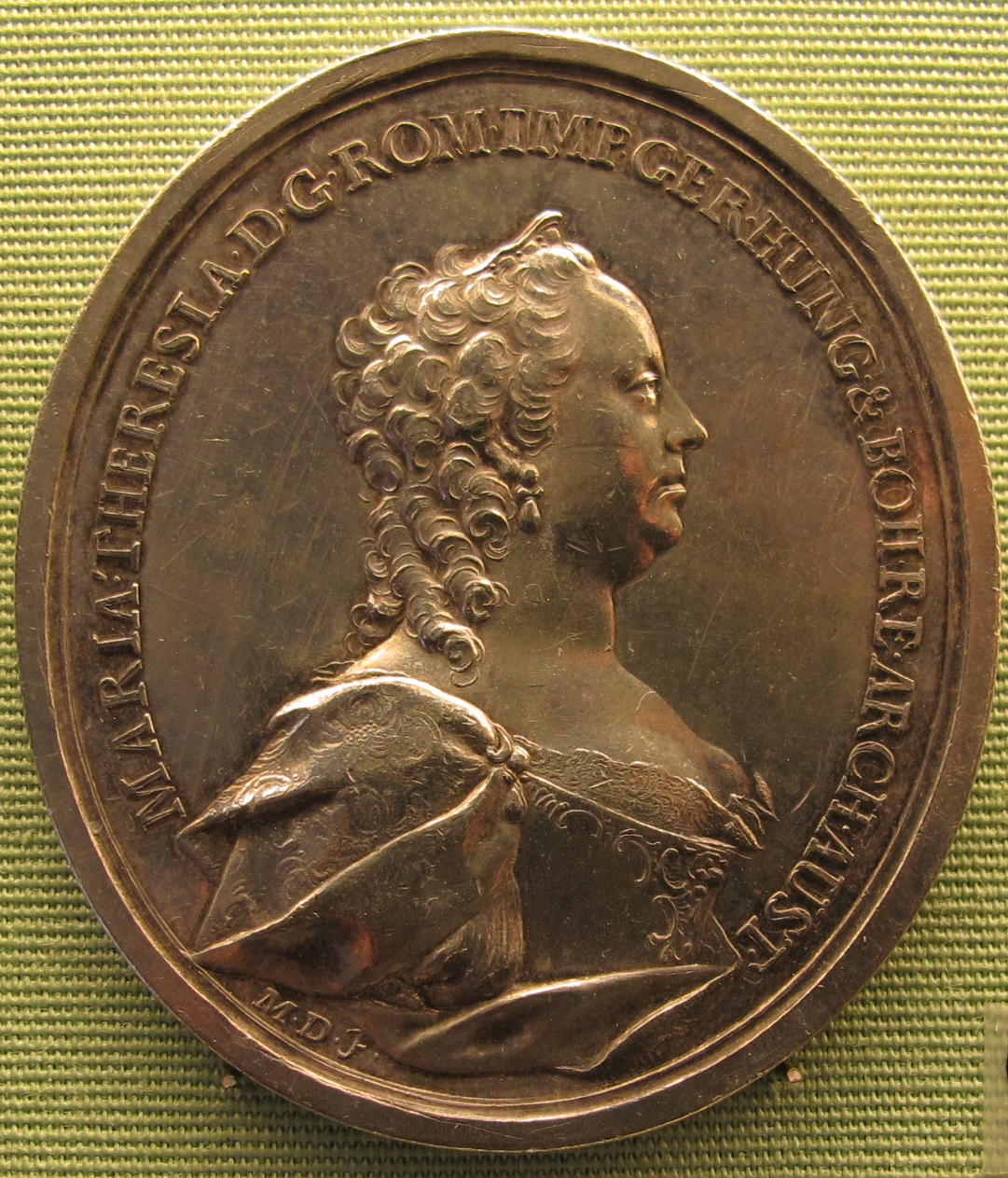 Celebrazione dell'incoronazione di maria teresa, 1765